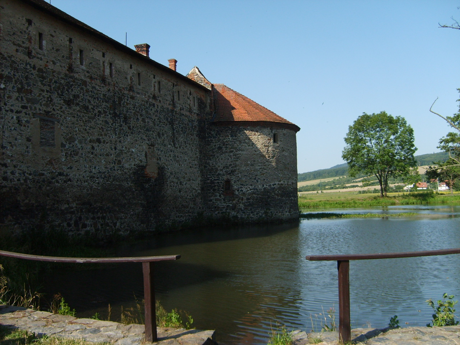 Vodní příkop na hradě Švihov.